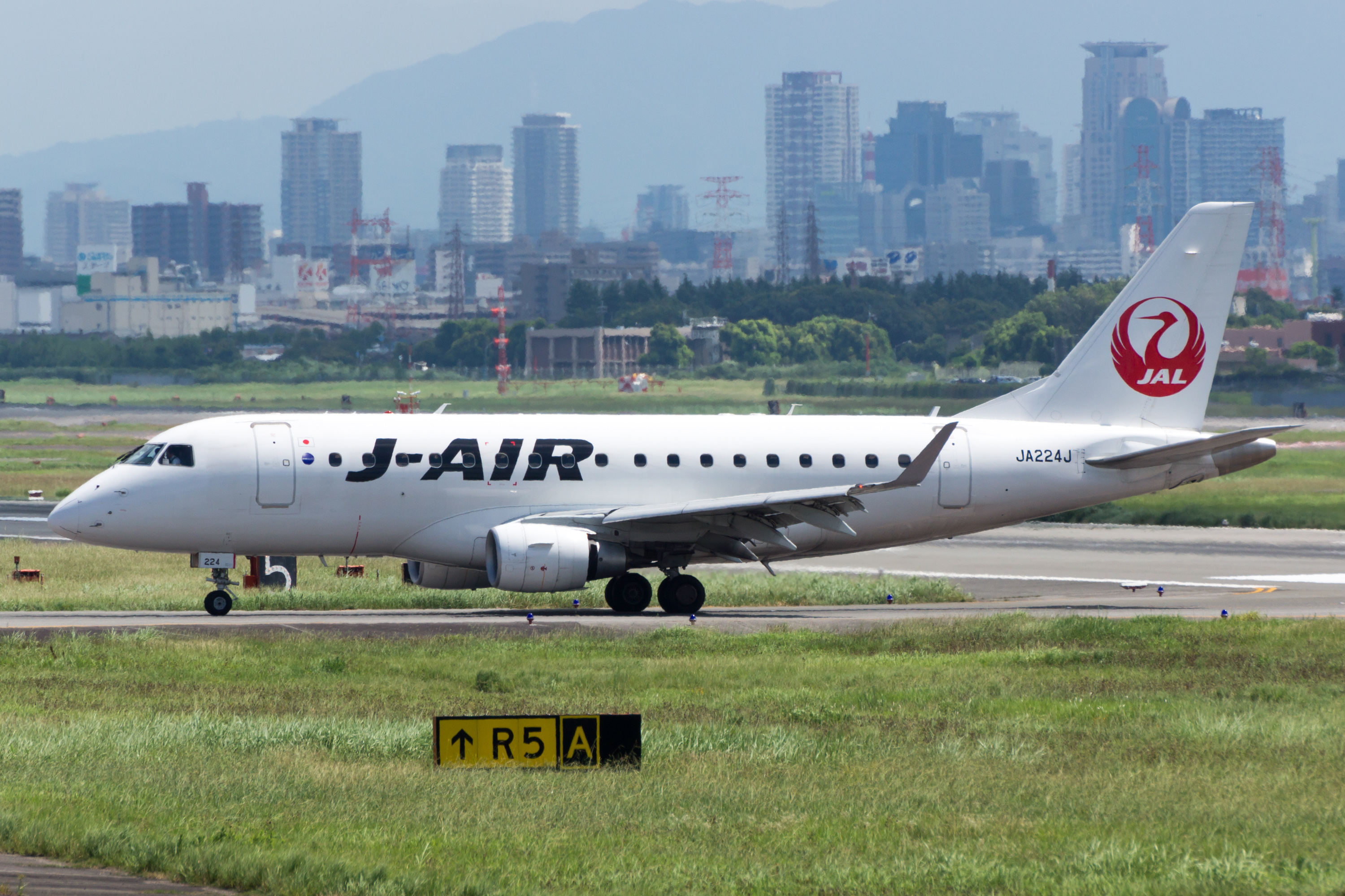 J-Air / ジェイ・エア Embraer ERJ-170-100 (ERJ-170STD) JA224J JL2374, Arrived from Nagasaki Osaka Itami Int'l Airport